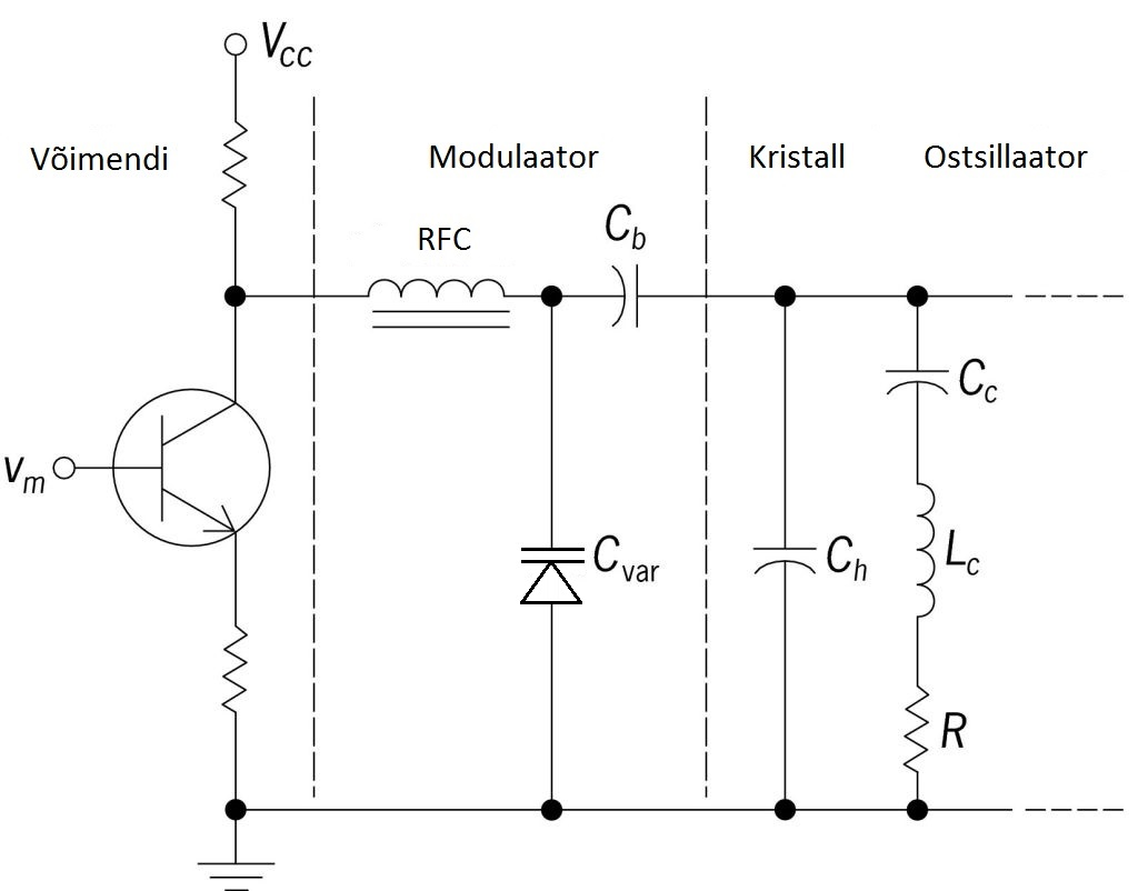 Lihtne varaktormodulaatori skeem, eesti keelde tõlgitud pilt